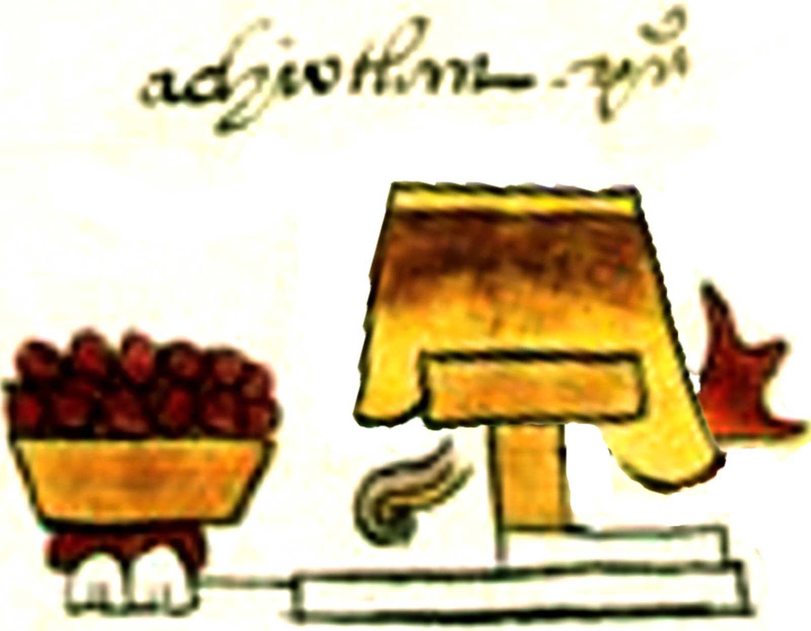 Glifo mostrando el color rojo de Achiutla.